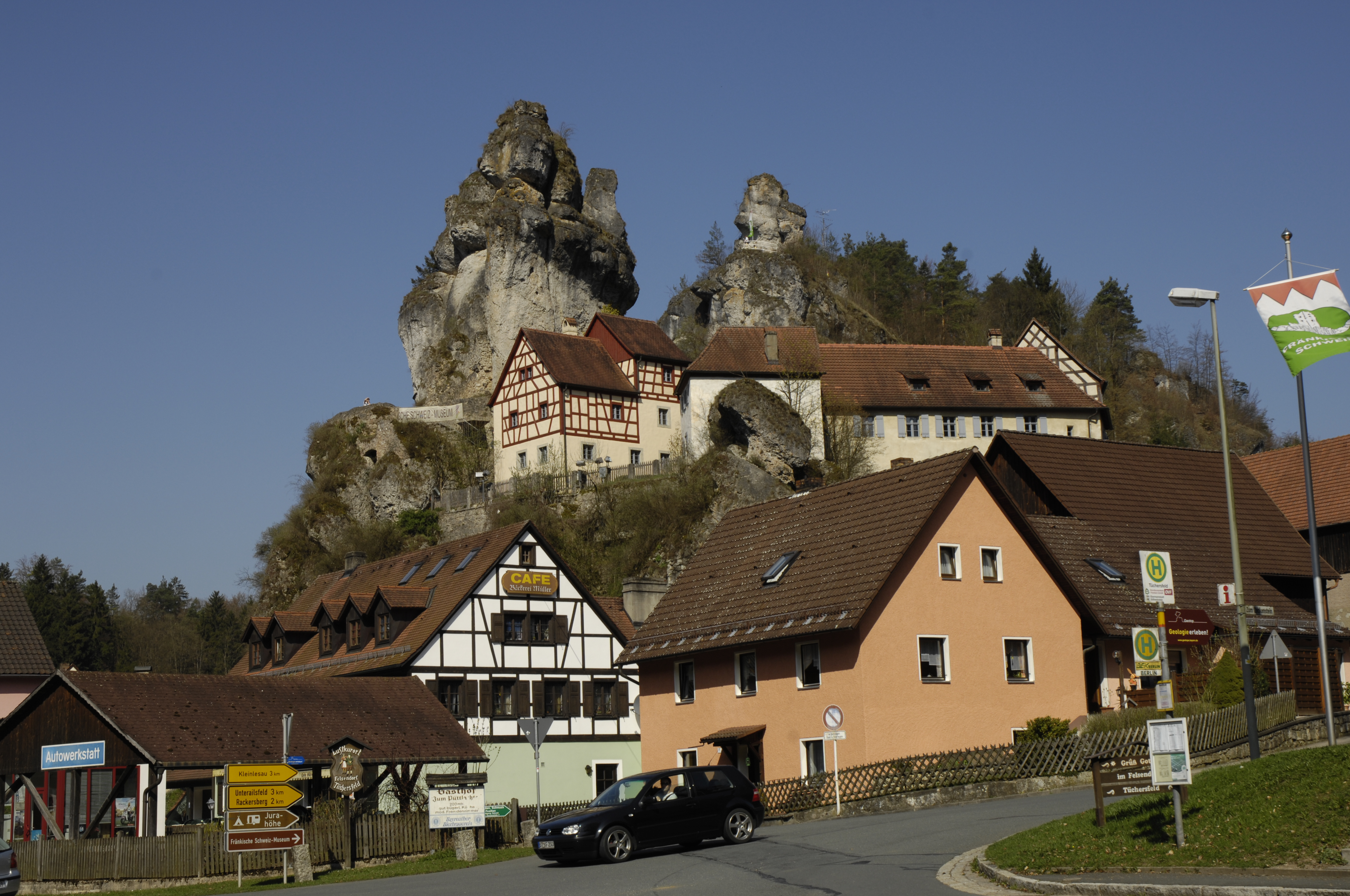 Tüchersfeld, Bebauung an den Felsen im Püttlachtal